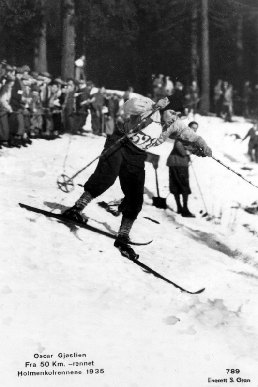 Norwegian skier Oscar Gjøslien in Holmenkollen